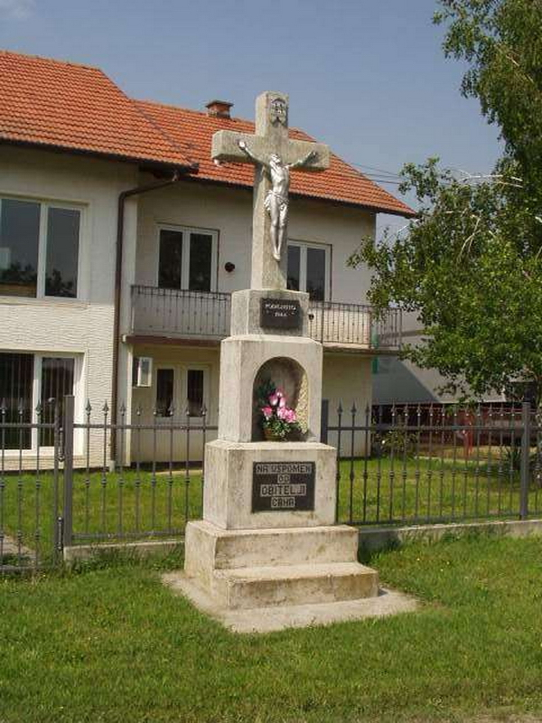 Brezje - Raspelo